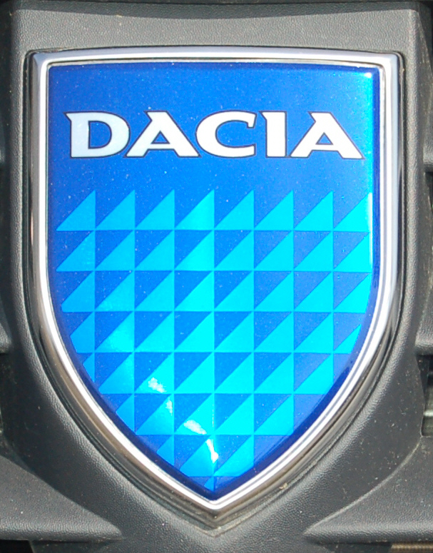 Das alte Logo der SC Automobile Dacia, bis 2008, selbst fotografiert am eigenen PKW.